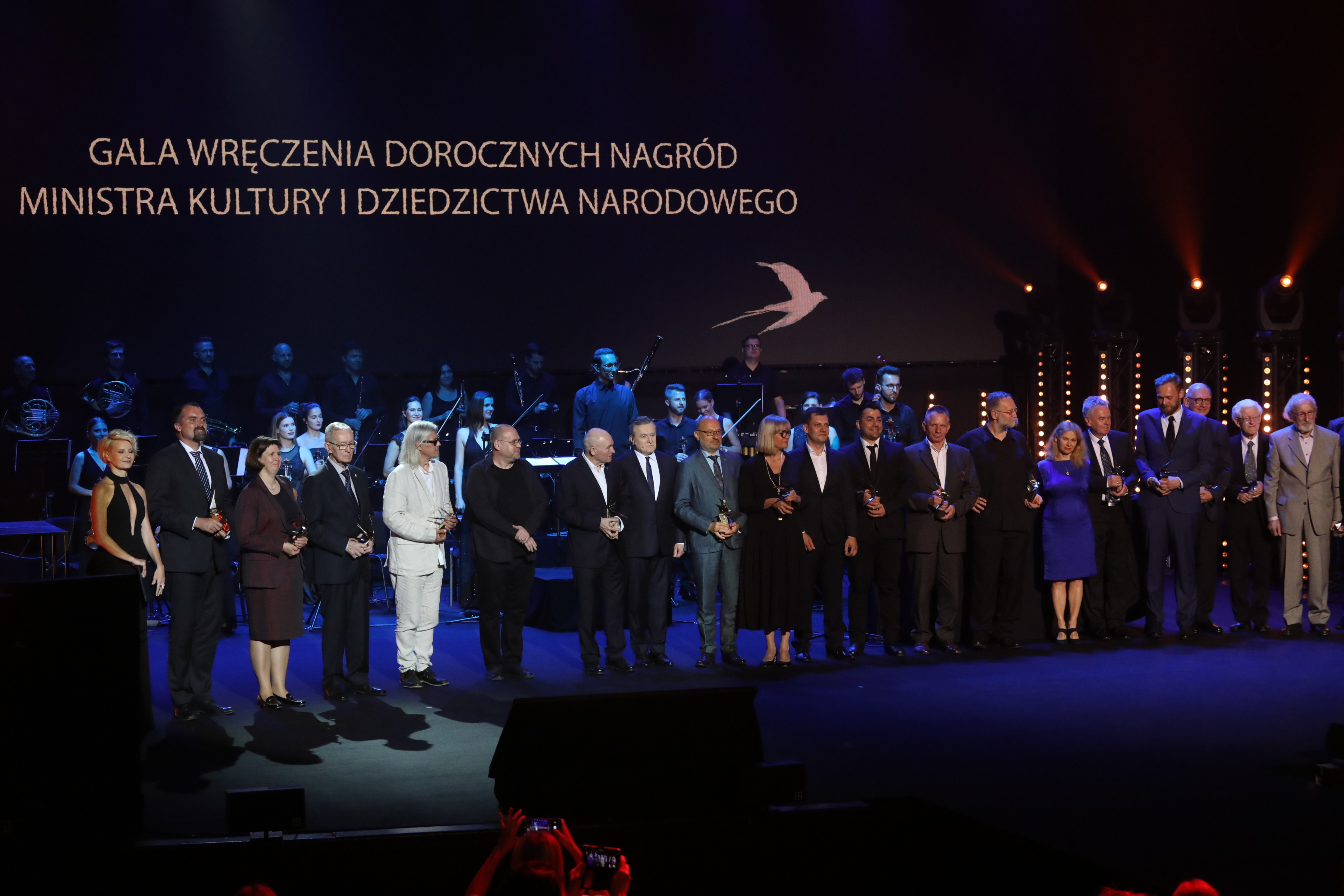 Gala wręczenia Dorocznych Nagród Ministra Kultury i Dziedzictwa Narodowego w 2019, Teatr Narodowy w Warszawie.